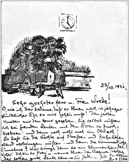 Zeichnung und Brief von Heinrich Zille an Bertha und Otto Wrede